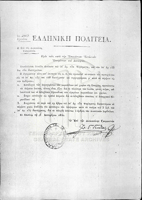 Ενδεικτική εγκύκλιος που εξεδώθει επί υπουργίας Ιωάννη Γεννατά